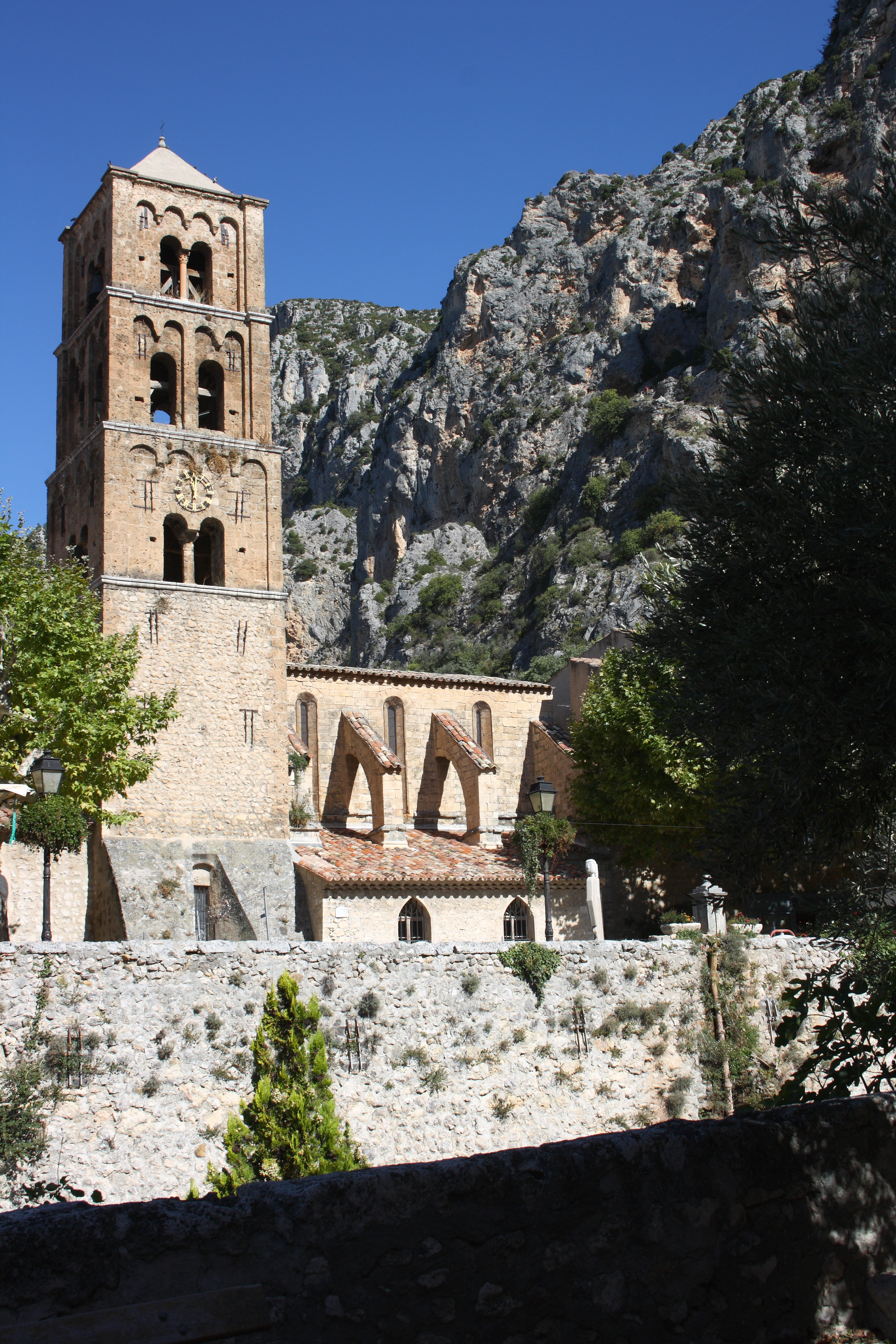 Romanischer Glockenturm der katholischen Pfarrkirche Notre-Dame-de-l'Assomption in Moustiers-Sainte-Marie, einer Gemeinde im Département Alpes-de-Haute-Provence in der französischen Region Provence-Alpes-Côte d'Azur